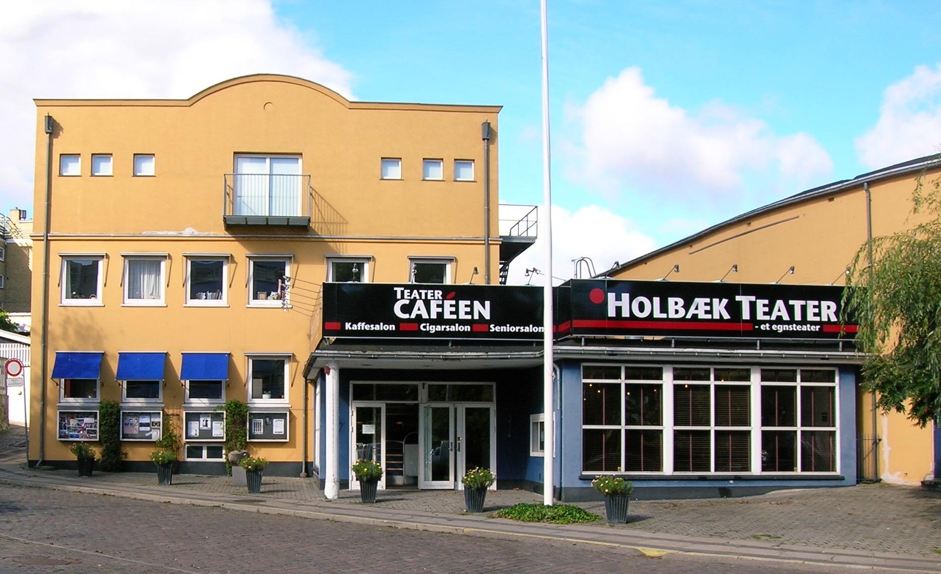 Holbæk Teater. I forgrunden ses hajtænder (vigelinje)